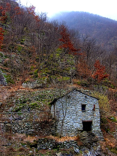 opera propria, foto, l'antico mulino di Castagnola prima del recupero, licenza libera